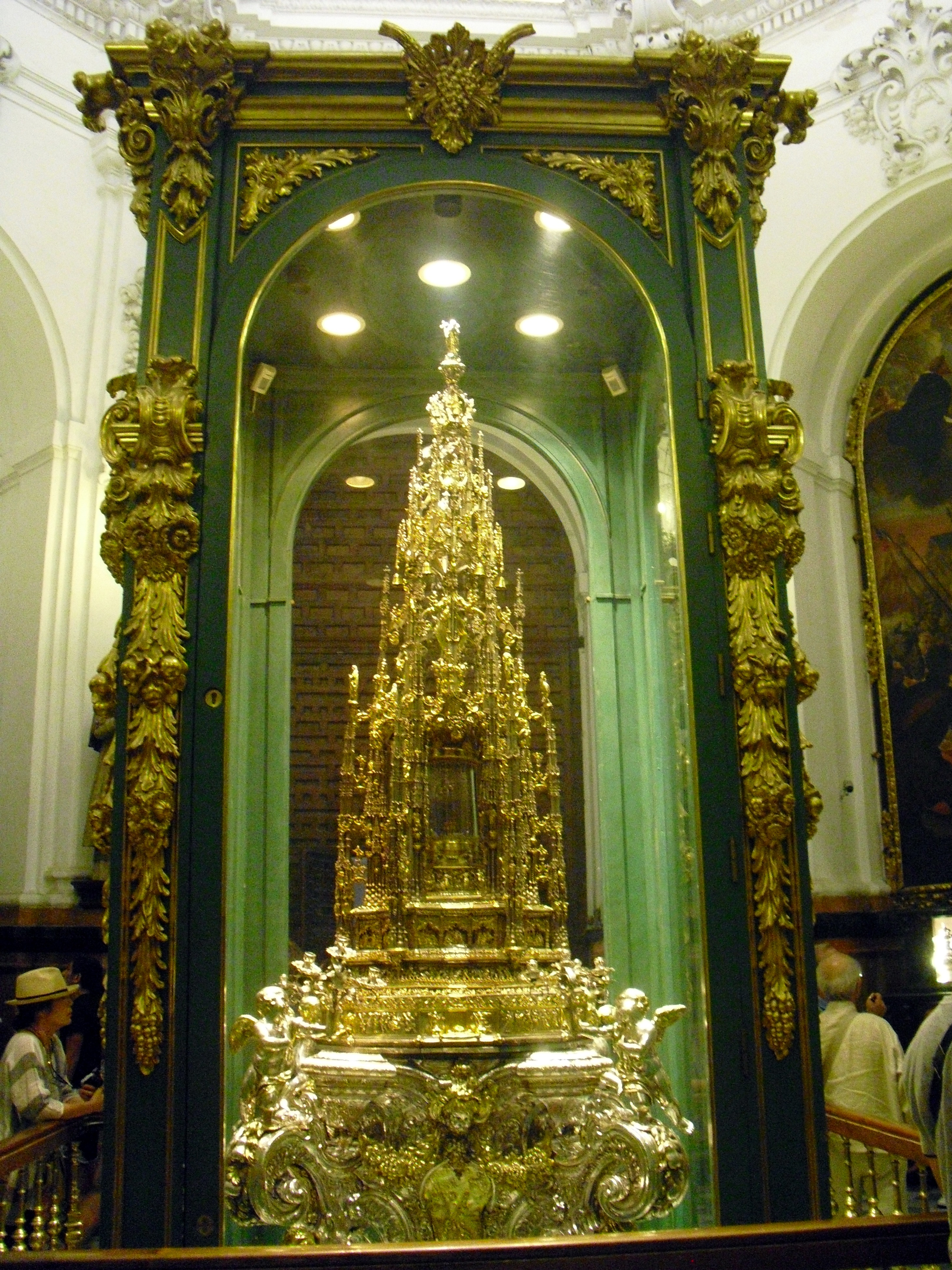 Custodia procesional de la Mezquita-catedral de Córdoba, (España). Fue realizada por el orfebre alemán Enrique de Arfe a principios del siglo XVI.